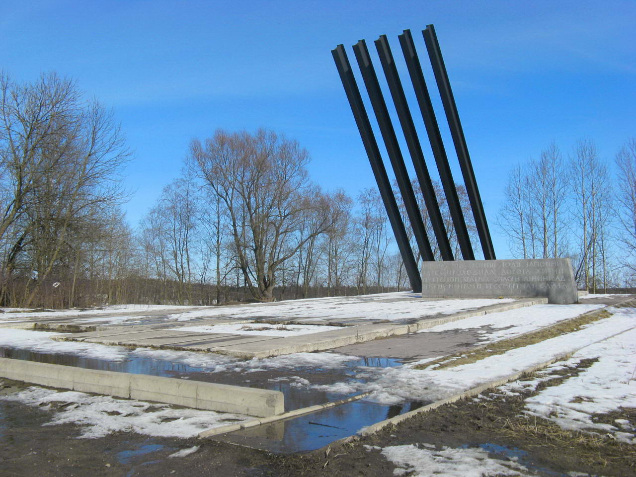 Монумент «Катюша» в деревне Корнево. Архитекторы А. Д. Левенков, П. И. Мельников и Л. В. Чулкевич (1965).